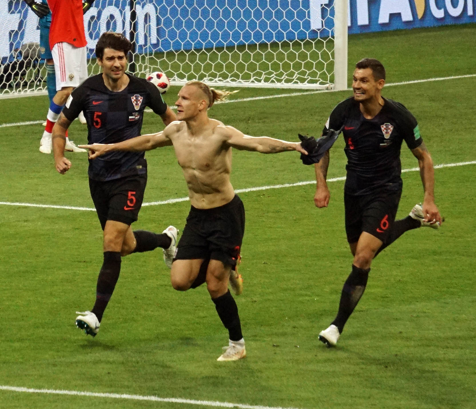 Домаго́й Ви́да (хорв. Domagoj Vida; 29 апреля 1989, Осиек, СФРЮ) — хорватский футболист, защитник турецкого клуба «Бешикташ» и национальной сборной Хорватии. 7 июля 2018 года сборная Хорватии обыграла сборную России со счётом 2:2 (4:3) по пенальти на ЧМ-2018 на стадионе «Фишт».